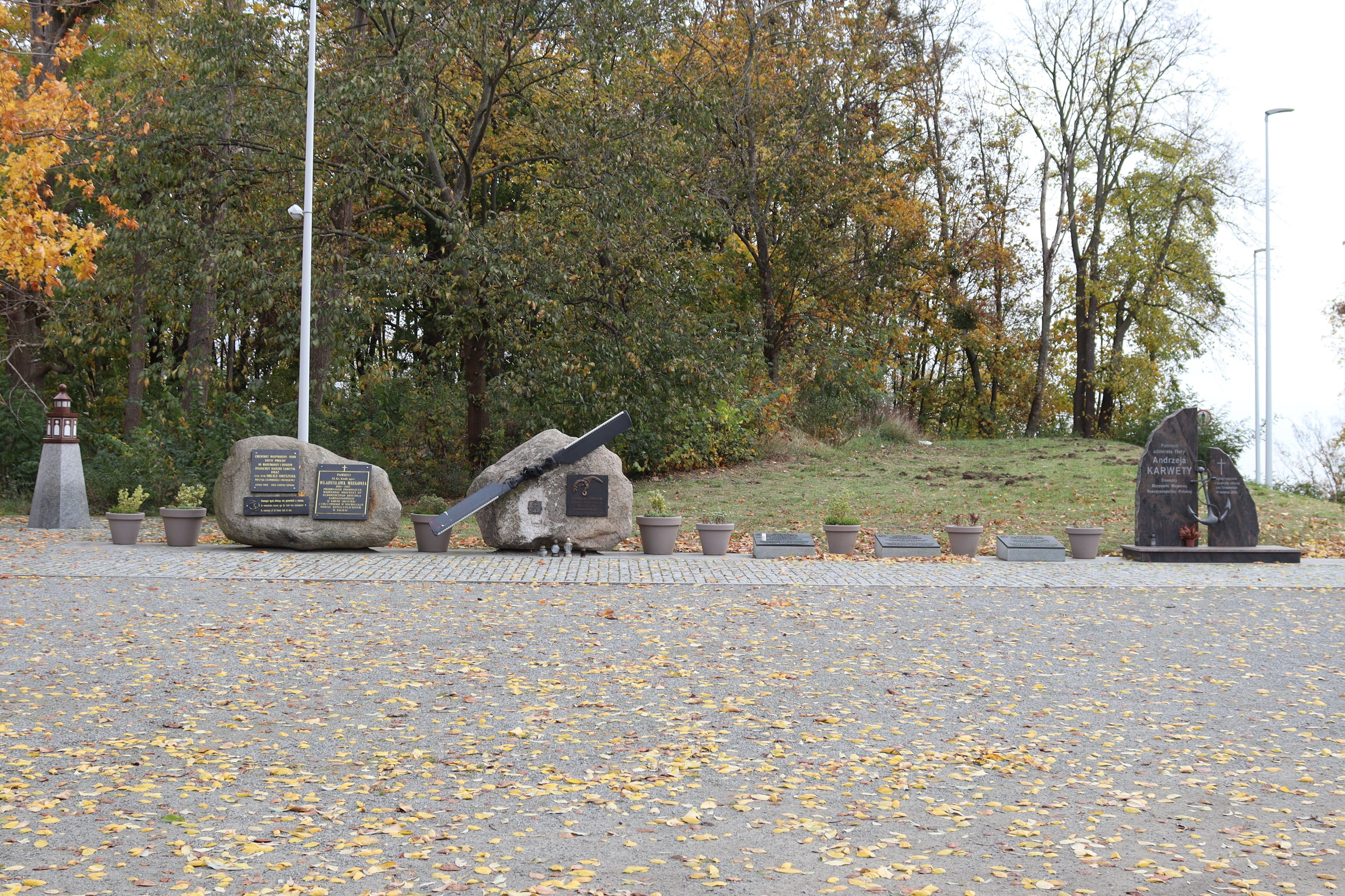 Cmentarz Marynarki Wojennej, od lewej: obelisk poświęcony żołnierzom baterii Canett, gen. Orlicz-Dreszerowi i ks. kmdr. ppor. Miegoniowi, obelisk poświęcony pamięci lotników, tablice twórców MW (płk Nowotnego, wadm. Porębskiego i wadm. Świrskiego) oraz pomnik pamięci adm. floty Karwety.